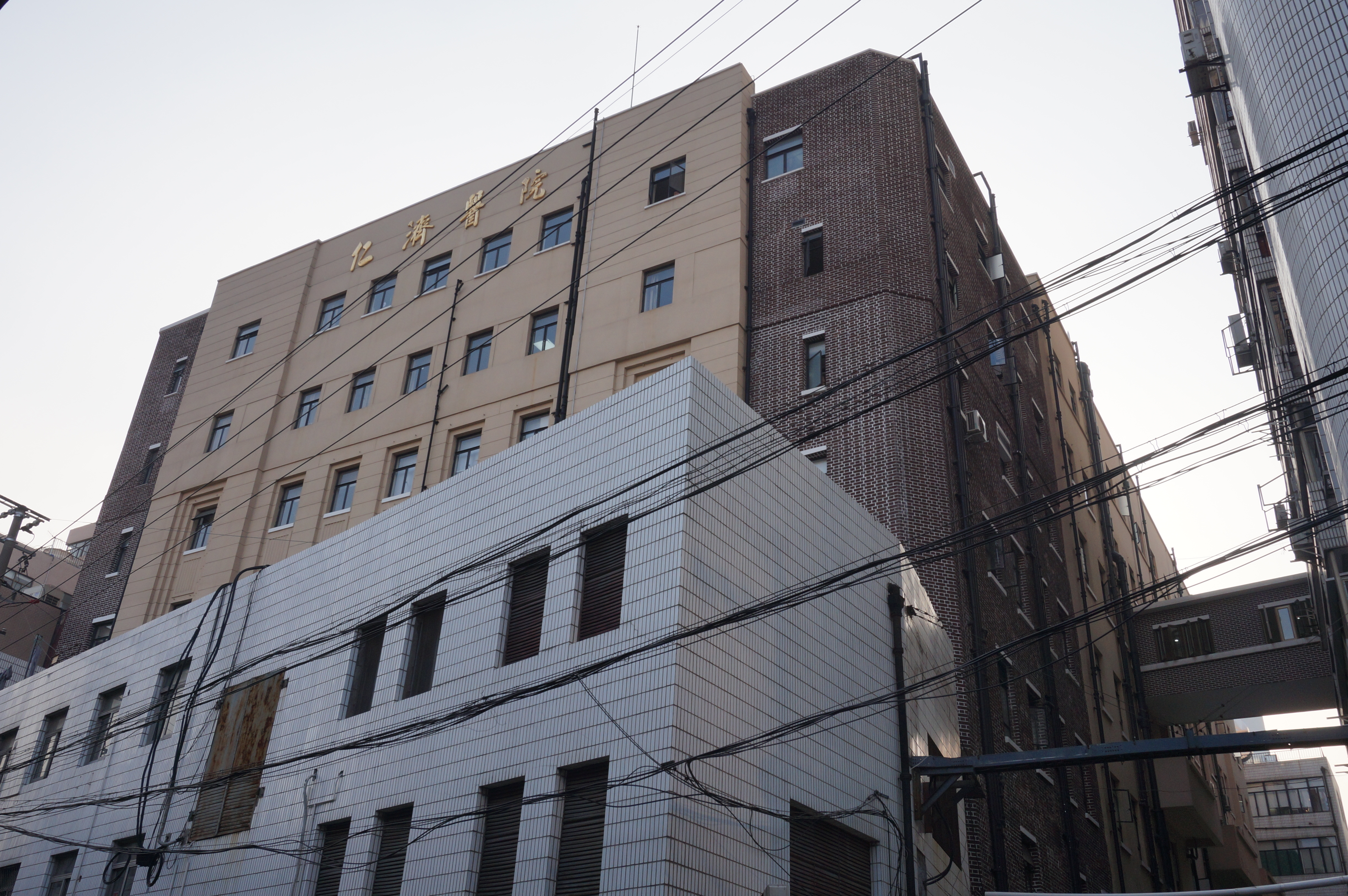 中文（中国大陆）: 上海仁济医院